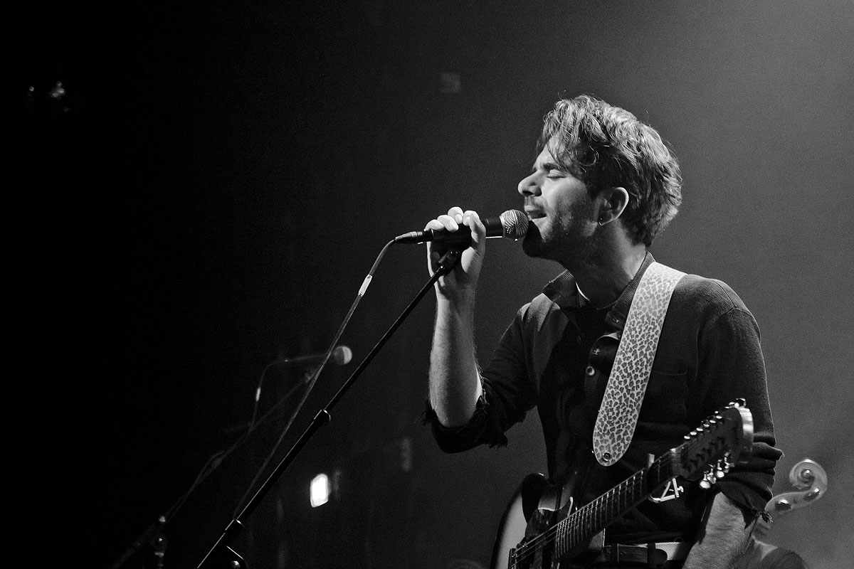 Jannis Noya Makrigiannis fra Choir of Young Believers